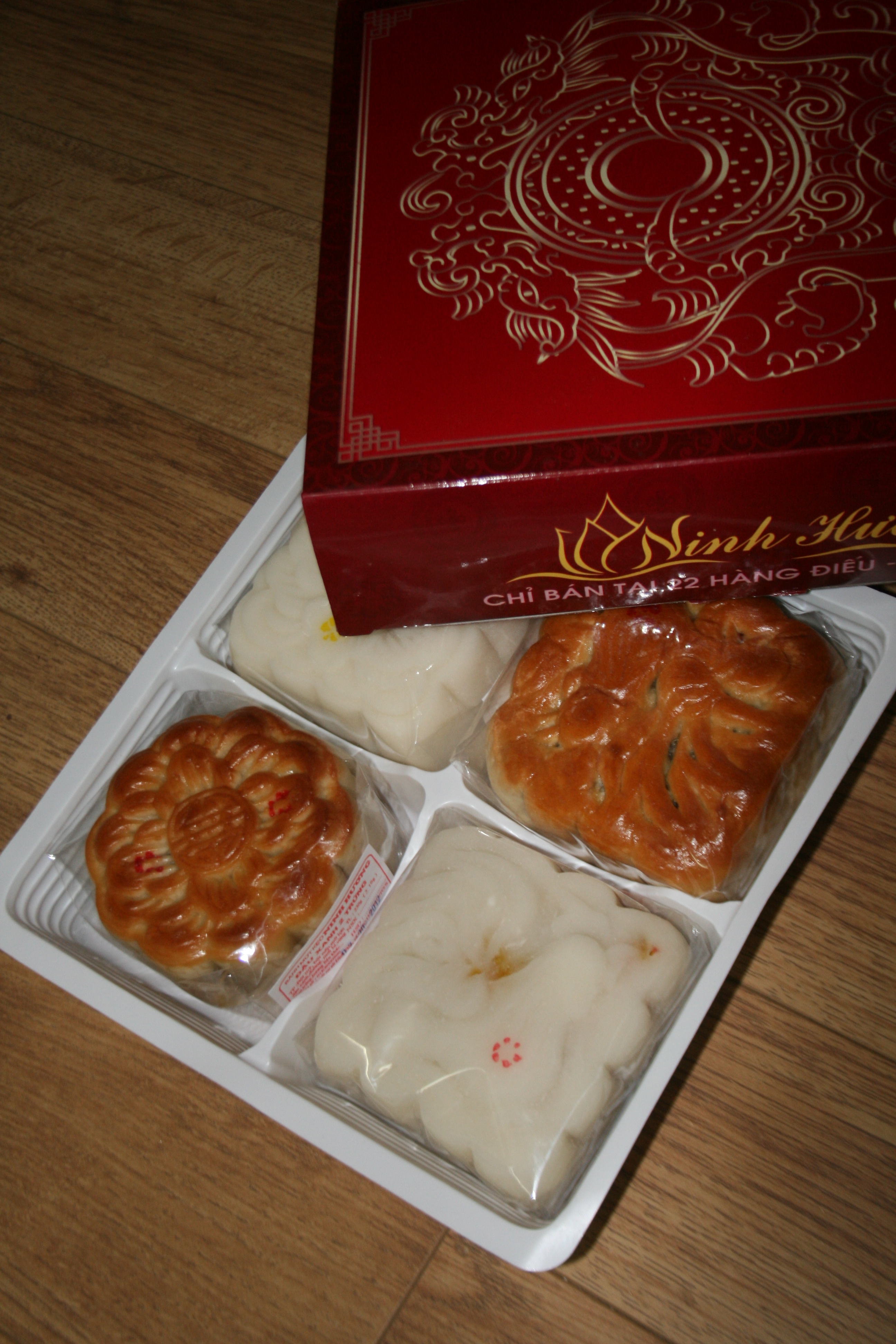 Hai cặp bánh trung thu: bánh nướng nhân đậu xanh trứng mặn và bánh nướng nhân thập cẩm; bánh dẻo nhân đậu xanh trứng mặn và bánh dẻo nhân thập cẩm.